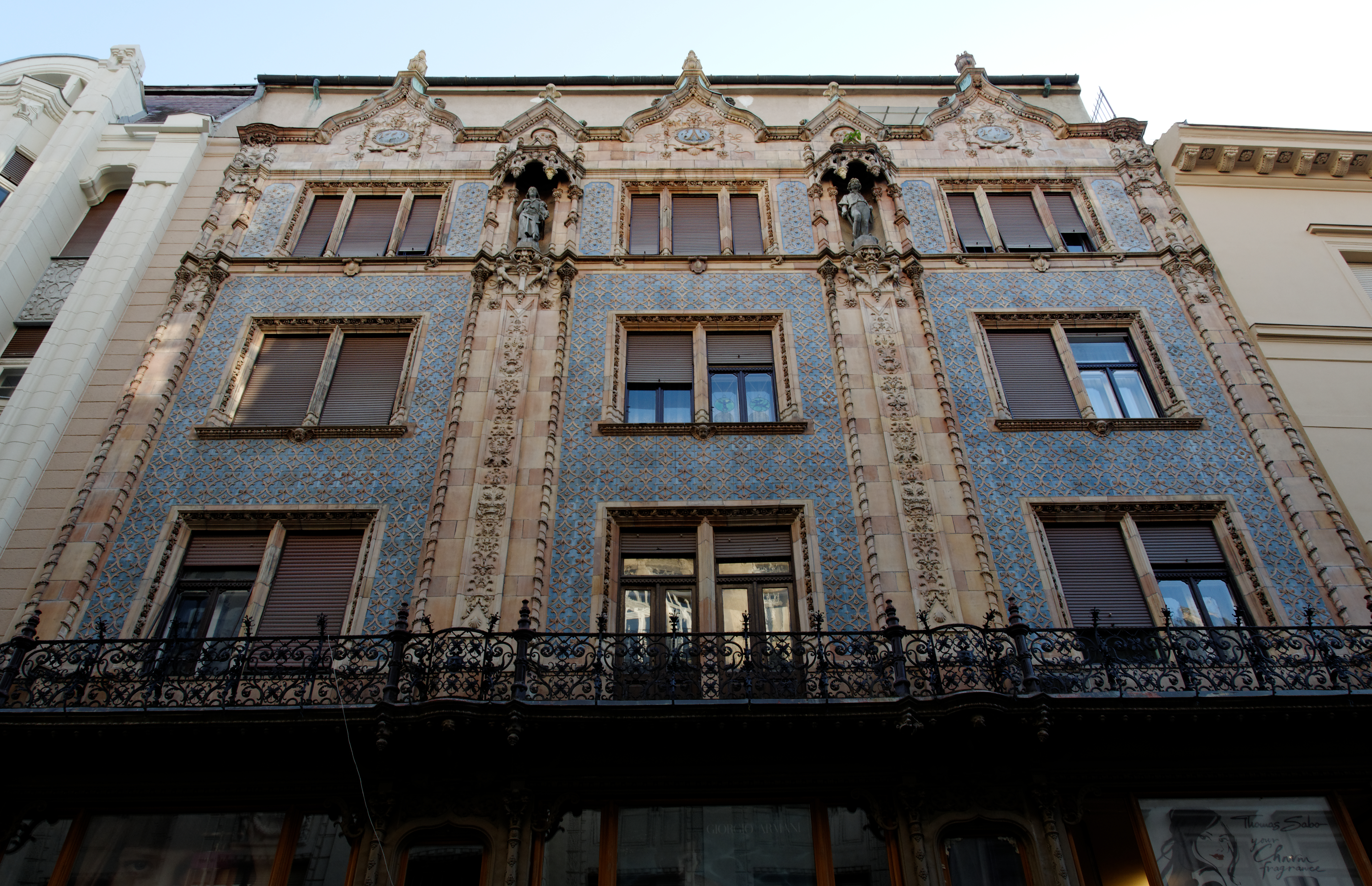 Maison Thonet, N°11 Váci utca Budapest (1889). De style Art nouveau, cette maison construite par Ödön Lechner présente en façade un décor en céramique de Zsolnay.